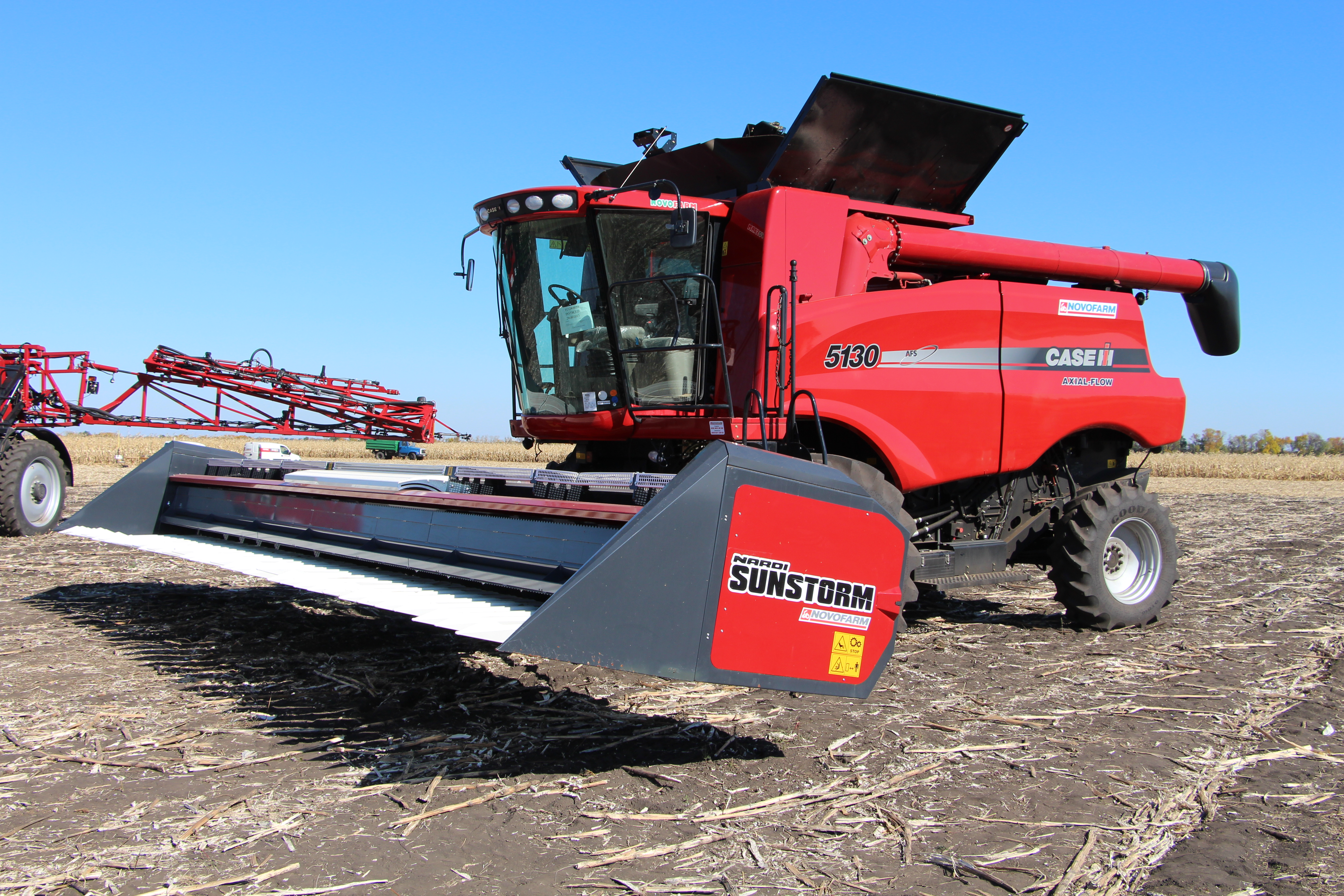 Комбайн Case IH Axial-Flow 5130